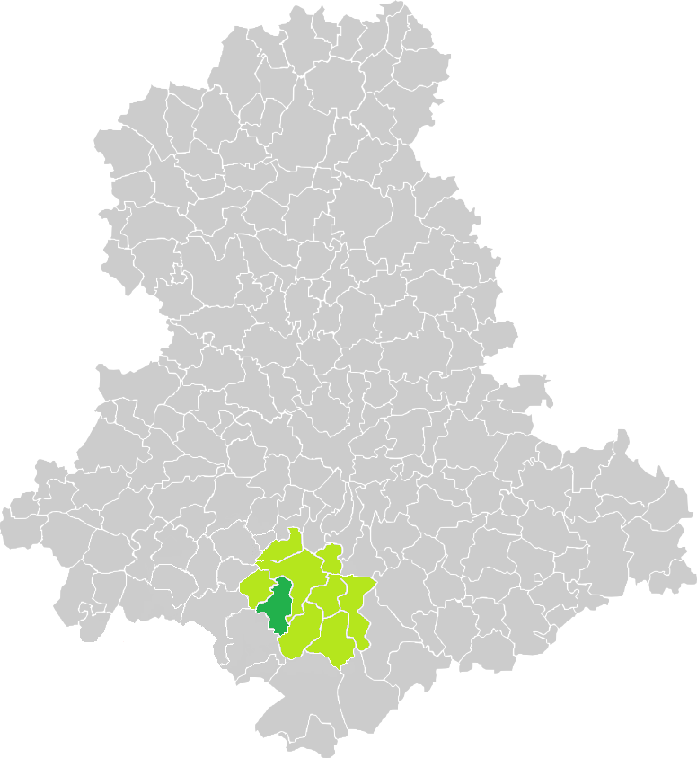 Carte de situation de la commune de Saint-Hilaire-les-Places (en vert foncé) dans le votre Canton (en vert clair) sur une carte des communes de la Haute-Vienne